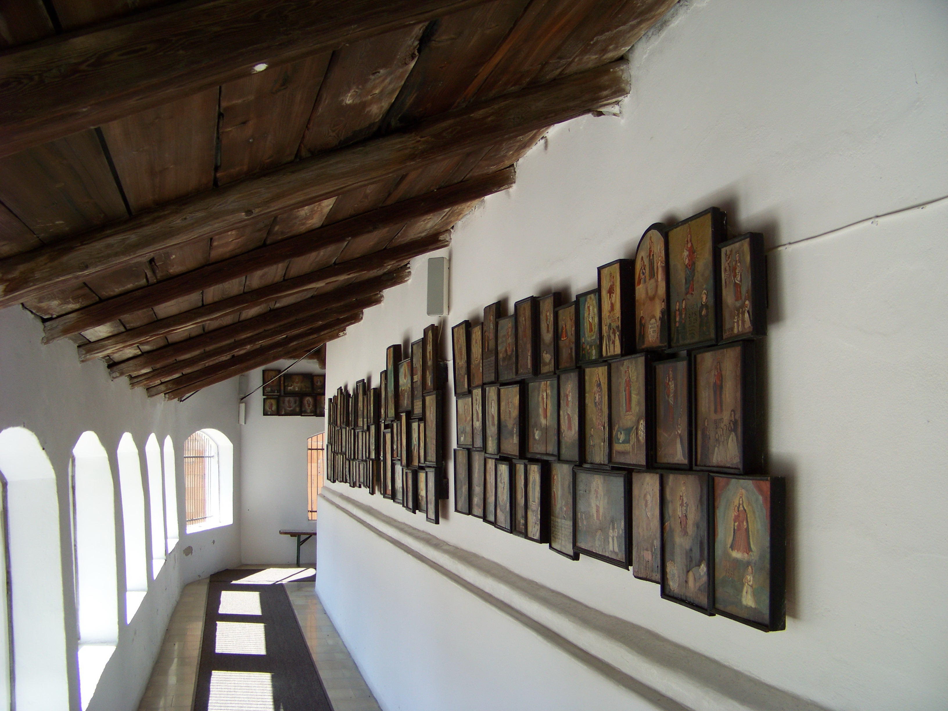 Laberweinting, Haader 20. Katholische Filialkirche St. Pauli Bekehrung. Saalkirche, erbaut 1750, südwestlich Turm mit Spitzhelm, das Turmuntergeschoss spätgotisch, Oberteil um 1854, an der Ost- Süd- und Westseite gedeckter Umgang, nach 1813; mit Ausstattung. Gleichzeitig ist sie Wallfahrtskirche "Zu unserer lieben Frau von Haader". Die Kirche liegt auf dem Pilgerweg "Via-Nova". Um die Kirche auf drei Seiten gemauerter Umgang, der mit einem Pultdach gedeckt ist mit stichbogigen Öffnungen. An der Kirche zahlreiche Votivtafeln auf Holz gemalt, hauptsächlich aus der ersten Hälfte des 19. Jahrhunderts.